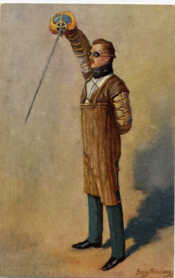 "Der Herr Paukant" (um 1900), Gemälde von Georg Mühlberg (1863-1925), Rechte abgelaufen. Ein Paukant (Fechter einer studentischen Mensur) mit Korbschläger "in verhängter Auslage" (einer Art Grundstellung), Gegenpaukant nicht dargestellt, als Schutzwaffen sind erkennbar Paukbrille (noch ohne Nasenblech), Halskrause, Armstulp und Paukschurz.